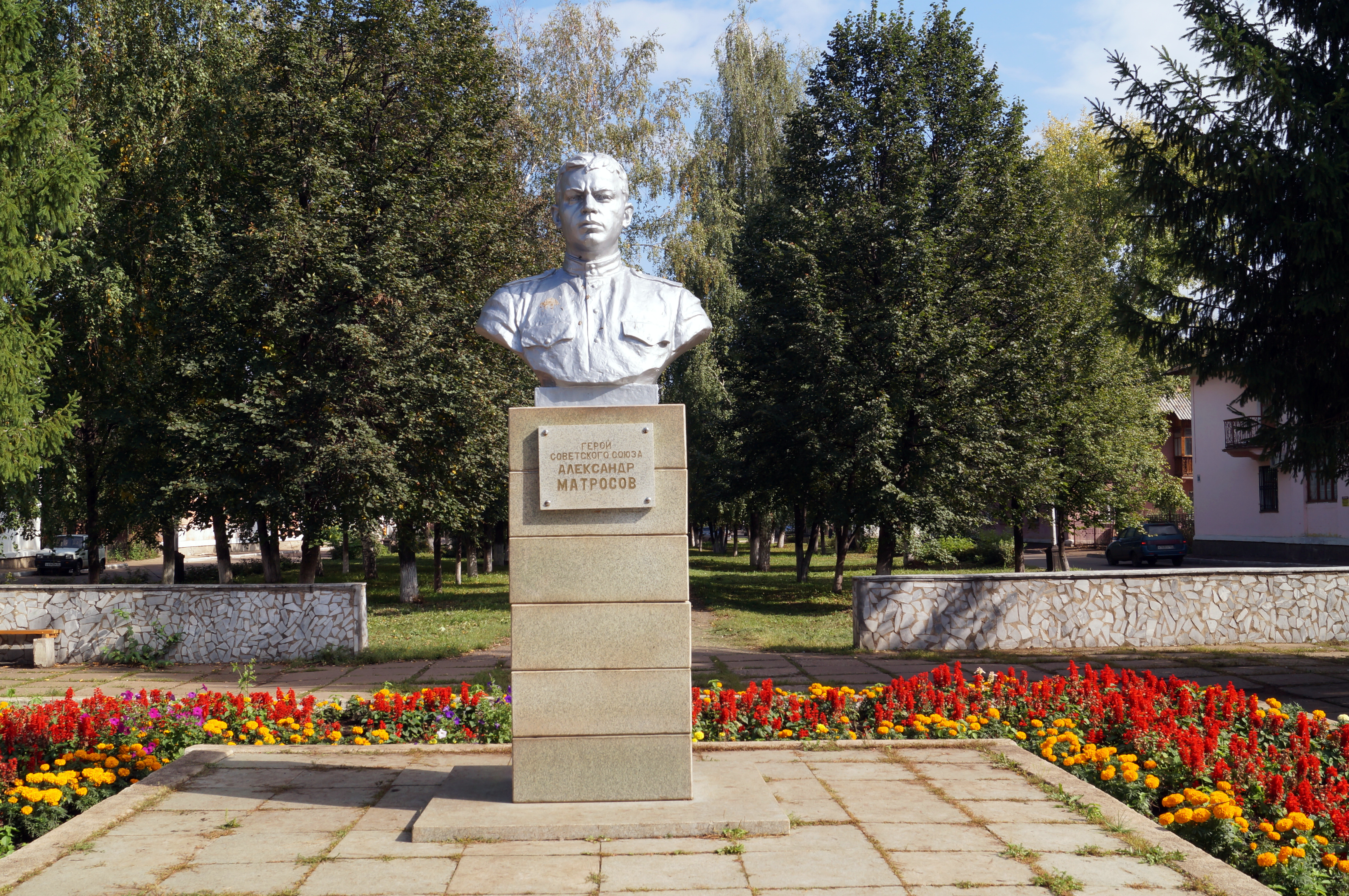 Улица Матросова (Салават, Республика Башкортостан)